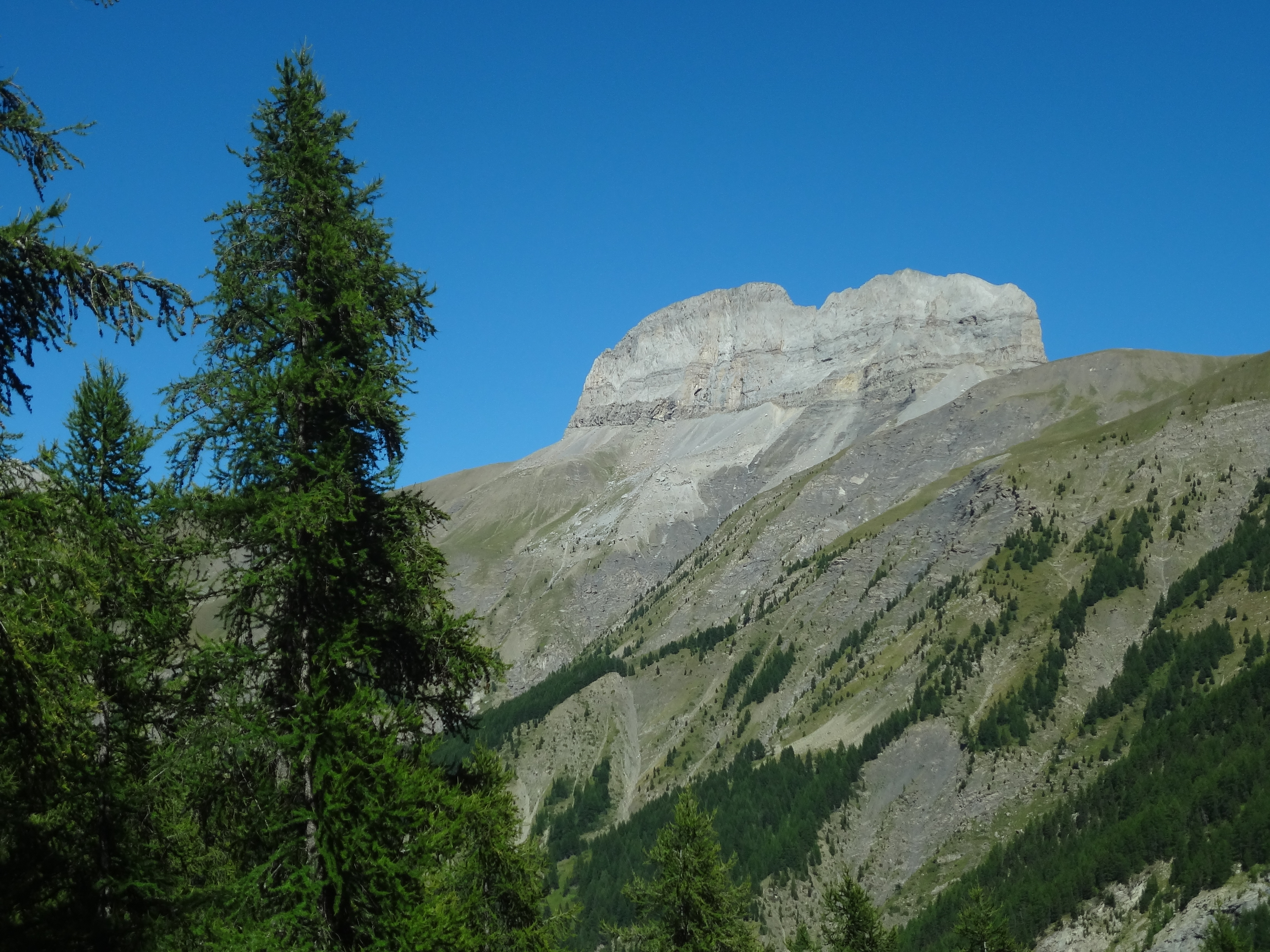 Grande Séolane (2909 m) vue du sud-ouest